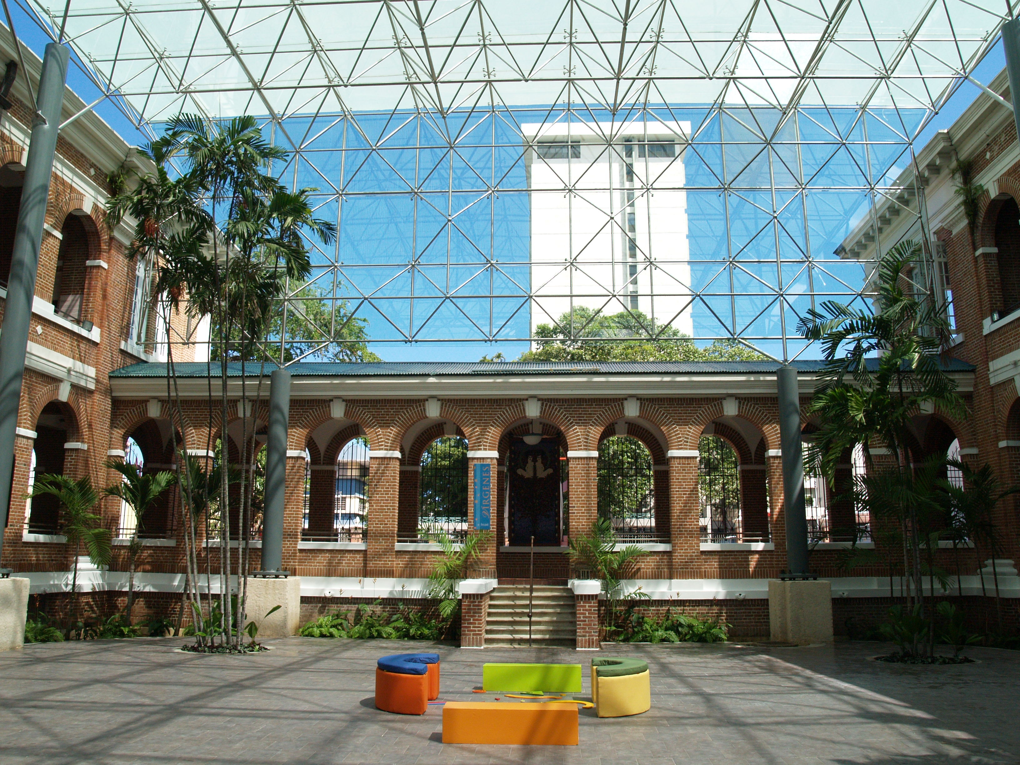 vista del patio interior del museo